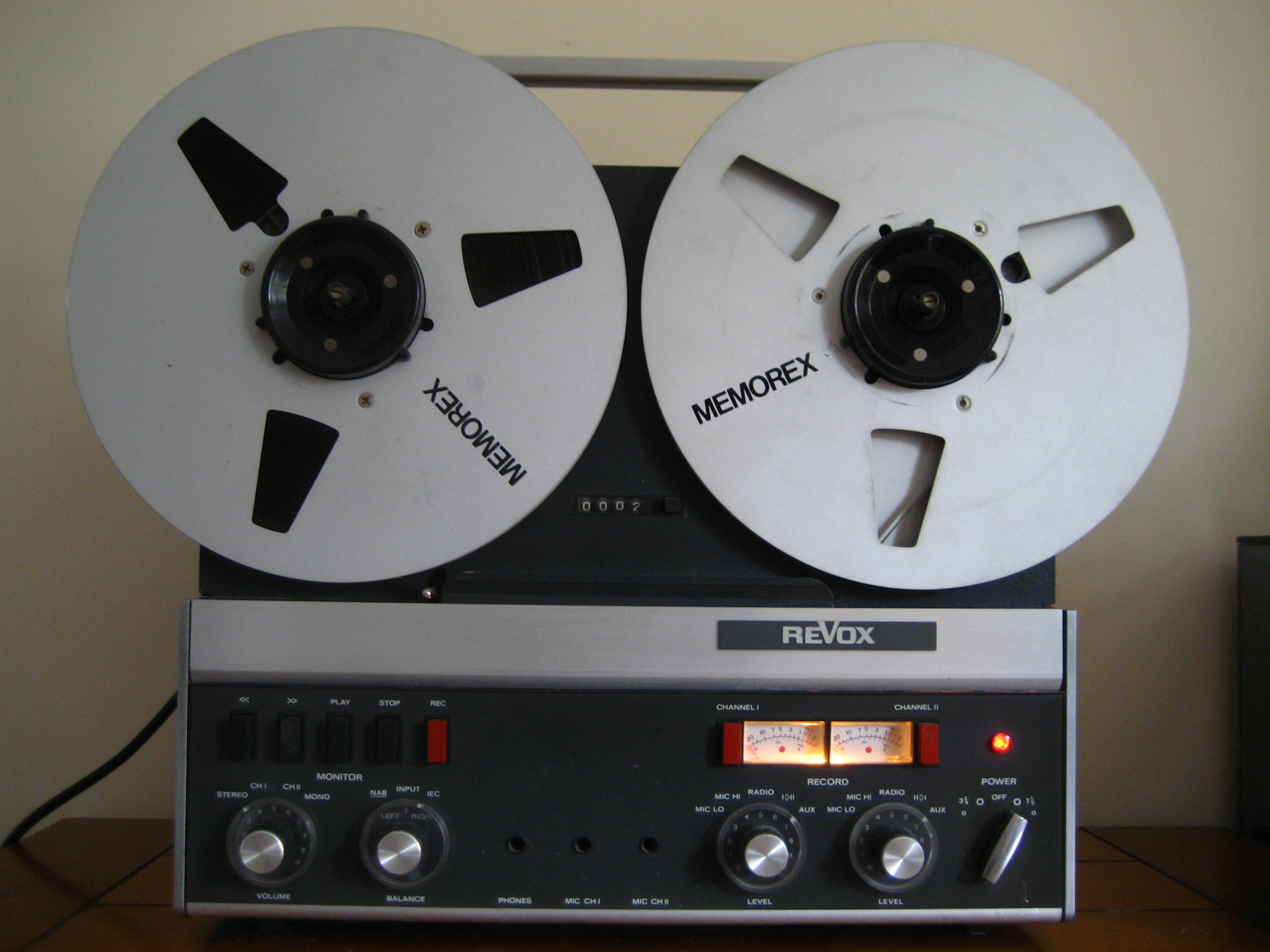 Revox A77 tape recorder